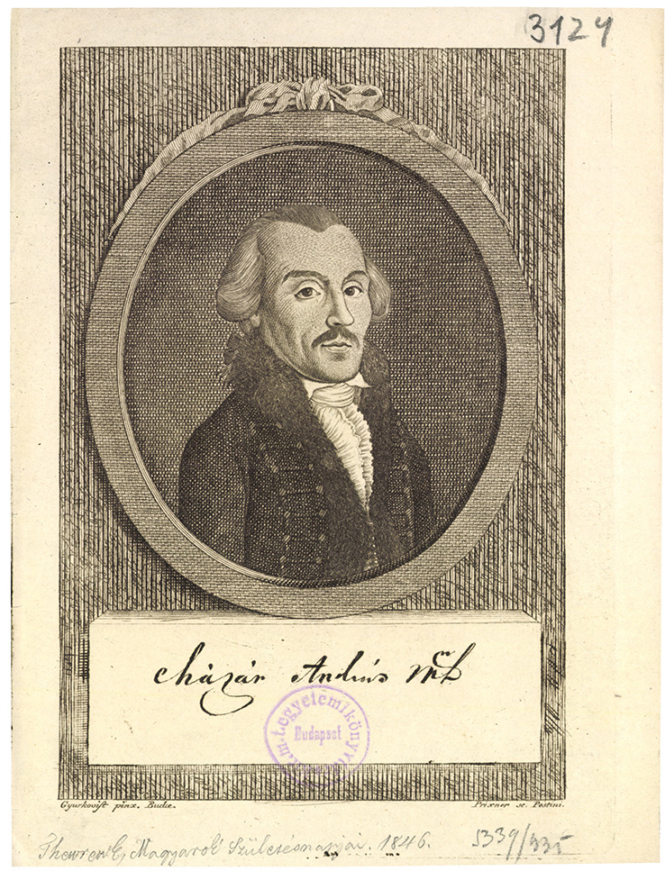 Cházár András portré Prixner Gottfried (ca. 1746-1846) metszete